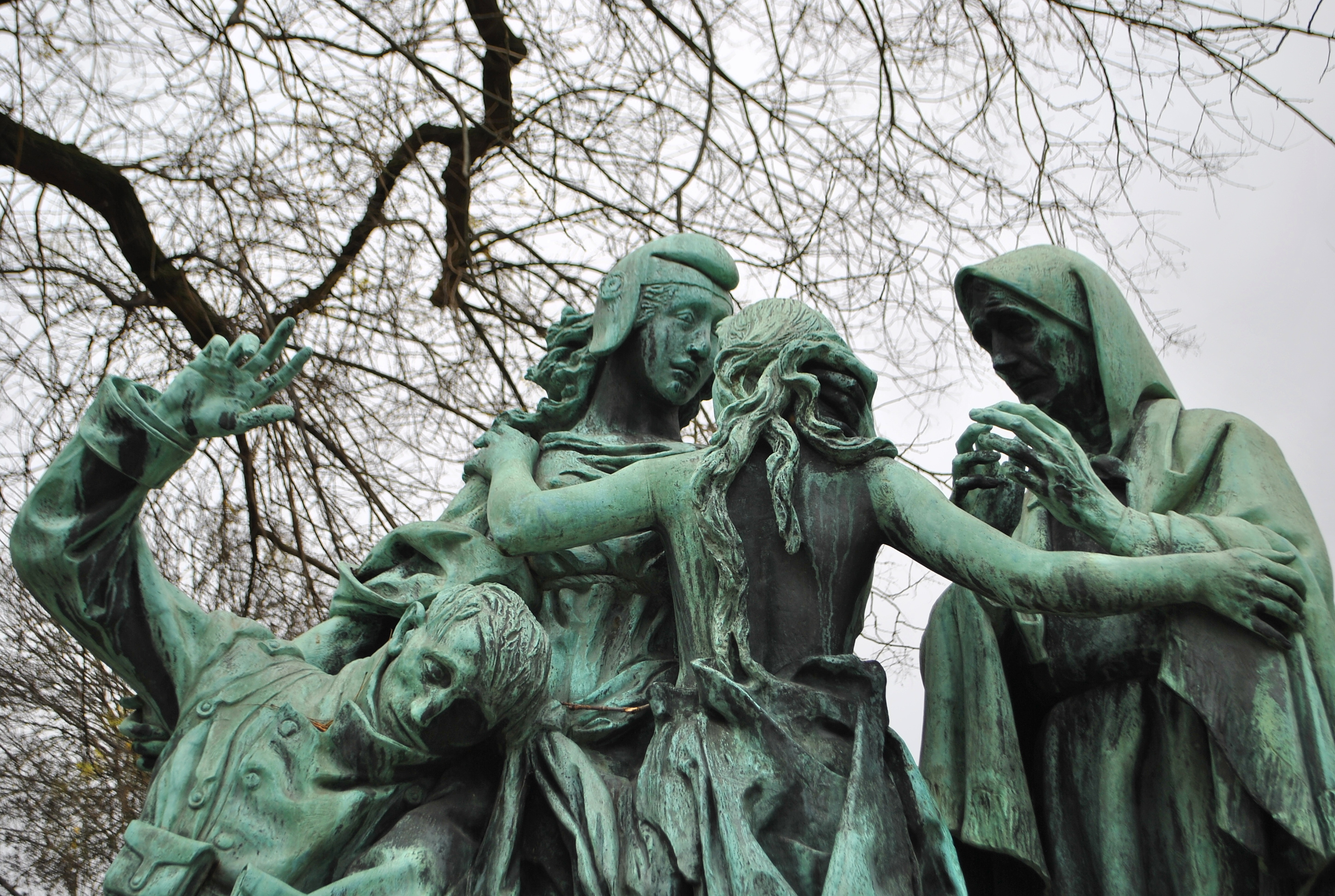 Hřbitov Père-Lachaise - památník padlým Čechoslovákům ve Francii za Francii a svou vlast v 1. světové válce (detail)